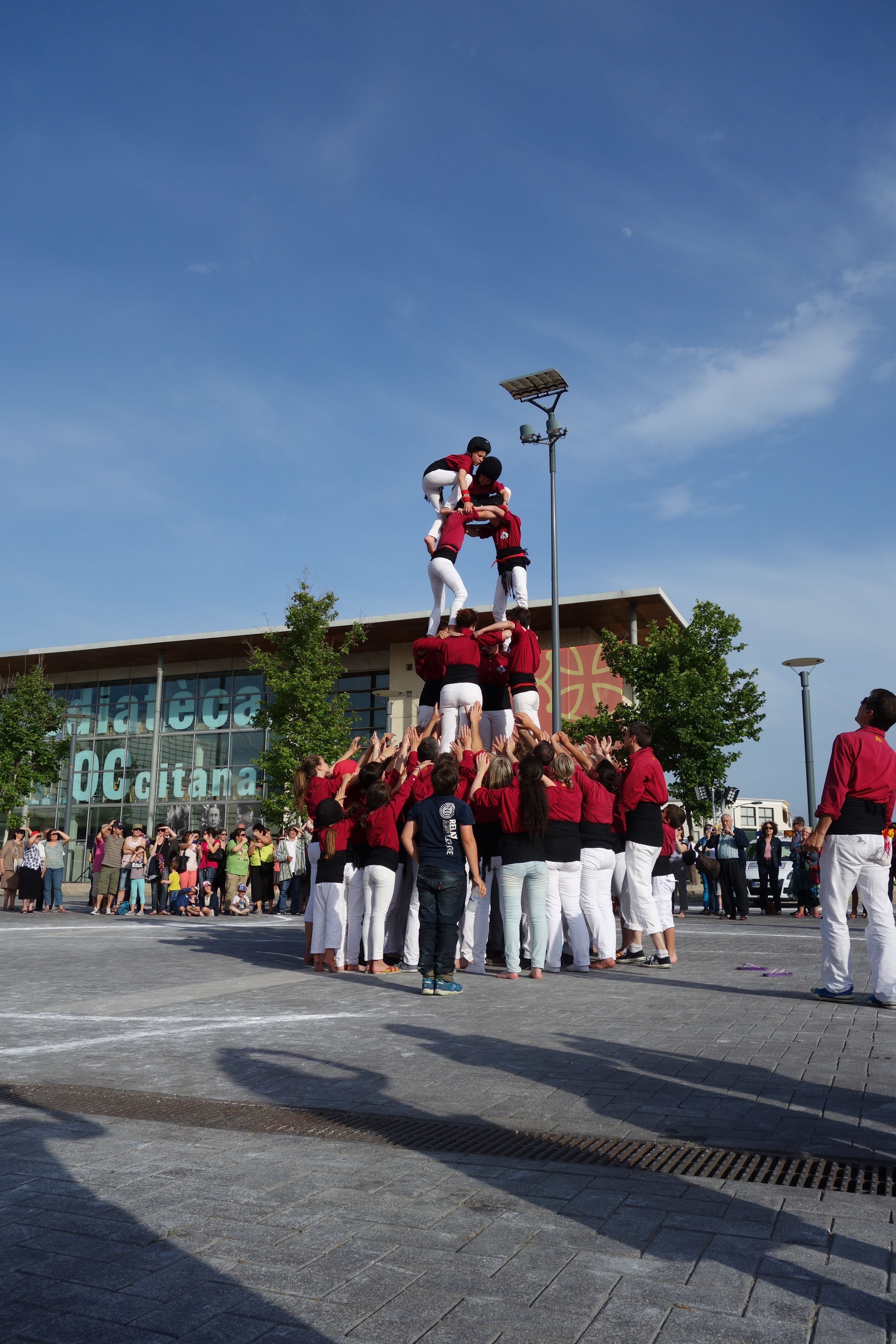 Lo_grand_recampament_castell2 Exhibició de la colla castellera "Pallagos del Conflent" a Besiers 2014